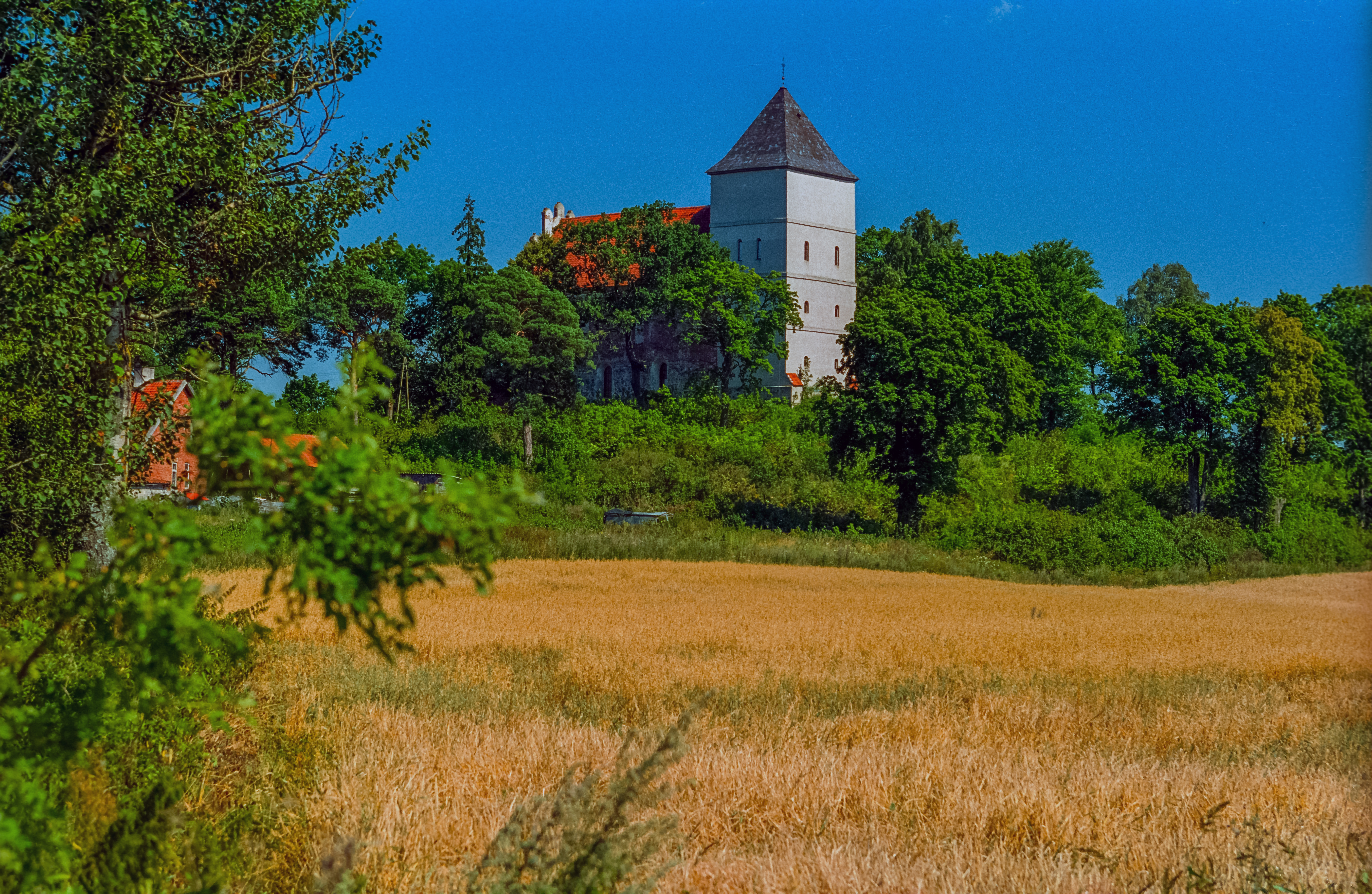 Bezławki, zamek przekształcony w kościół